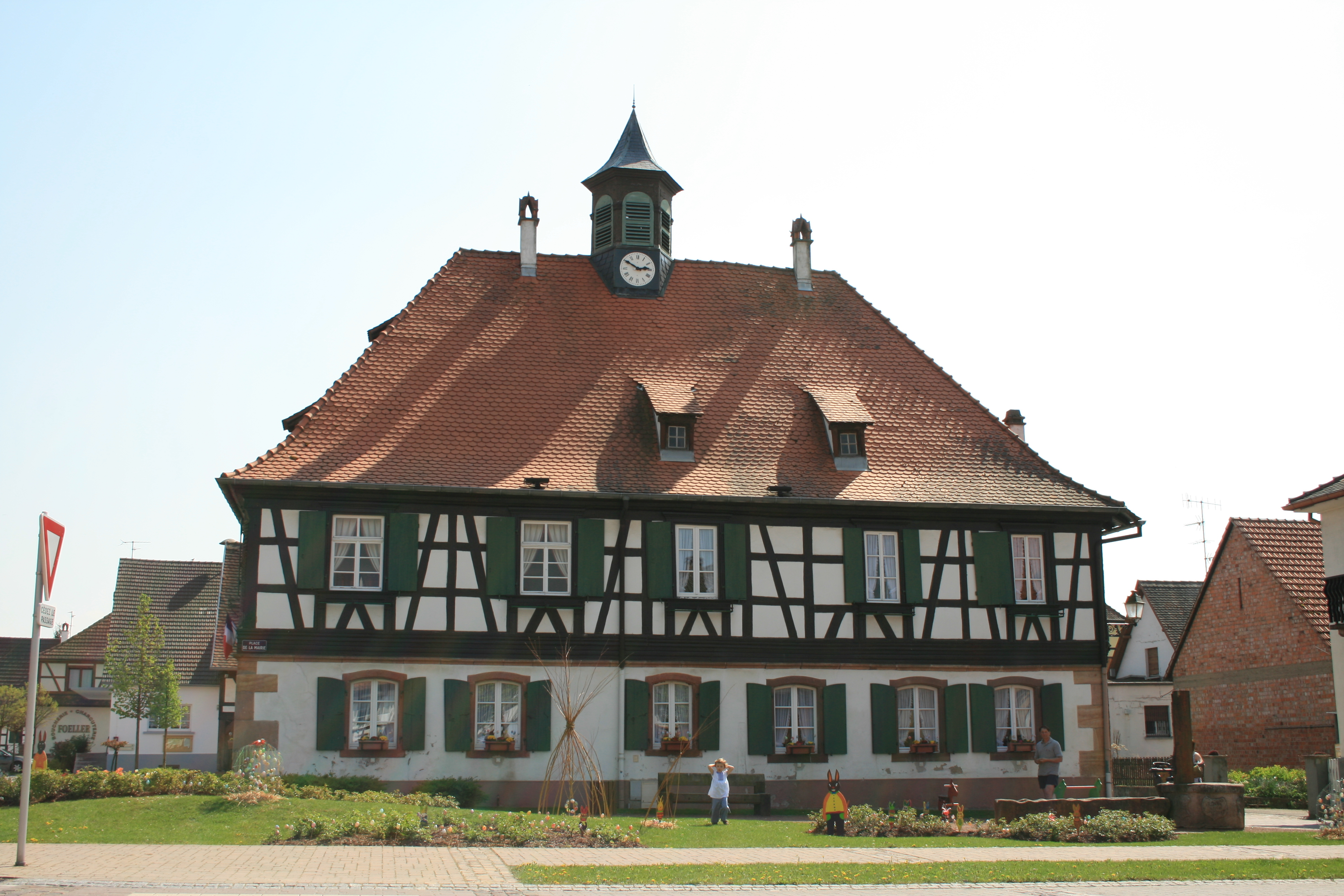 Mairie de Seebach, Alsace